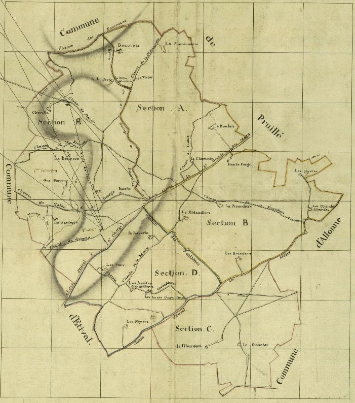 Plan du cadastre 1809 de Saint-Georges-du-Bois dans le département français de la Sarthe